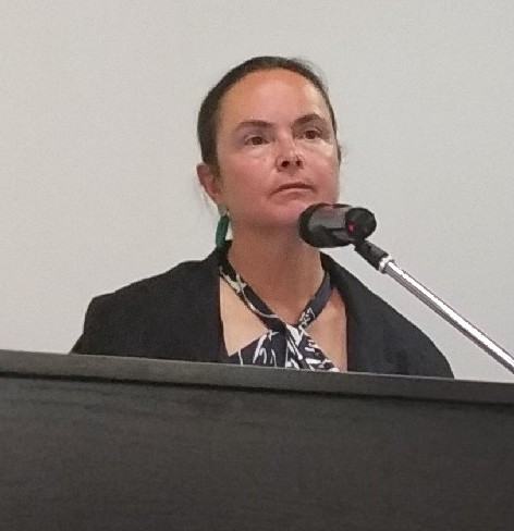 Британская славистка Катриона Келли в Екатеринбурге